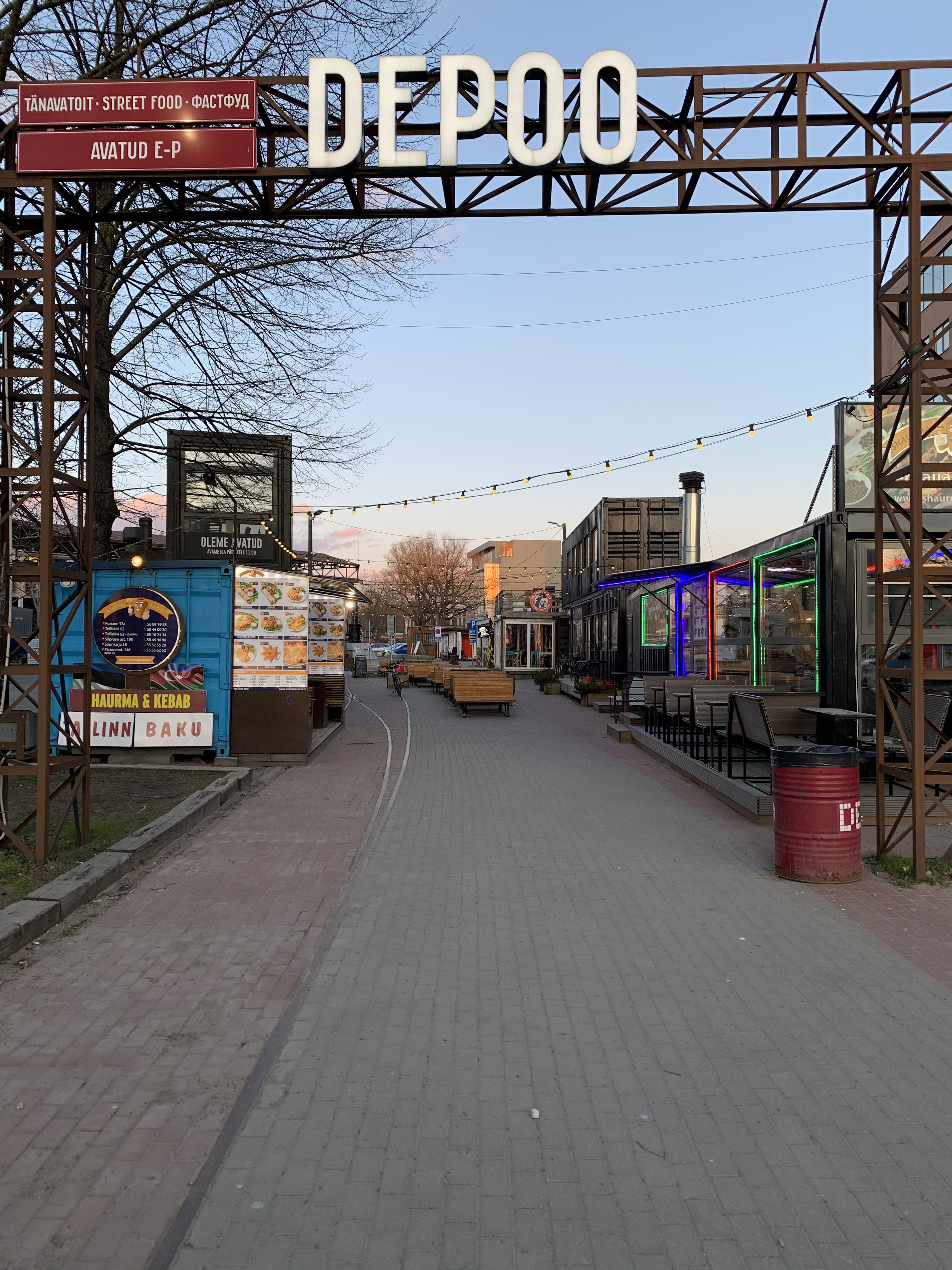 Toidutänava algus Telliskivi tänava poolt.